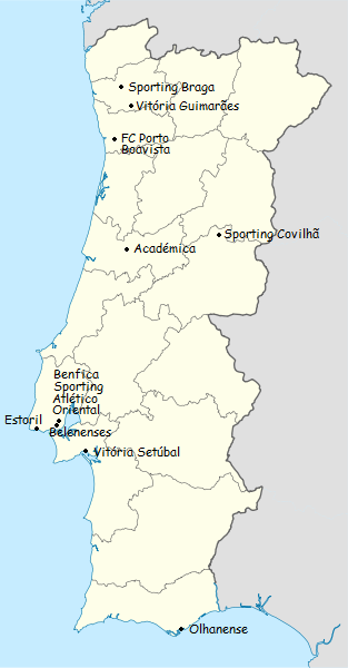 Carte des clubs participants du championnat du portugal de football de première division 1950-1951